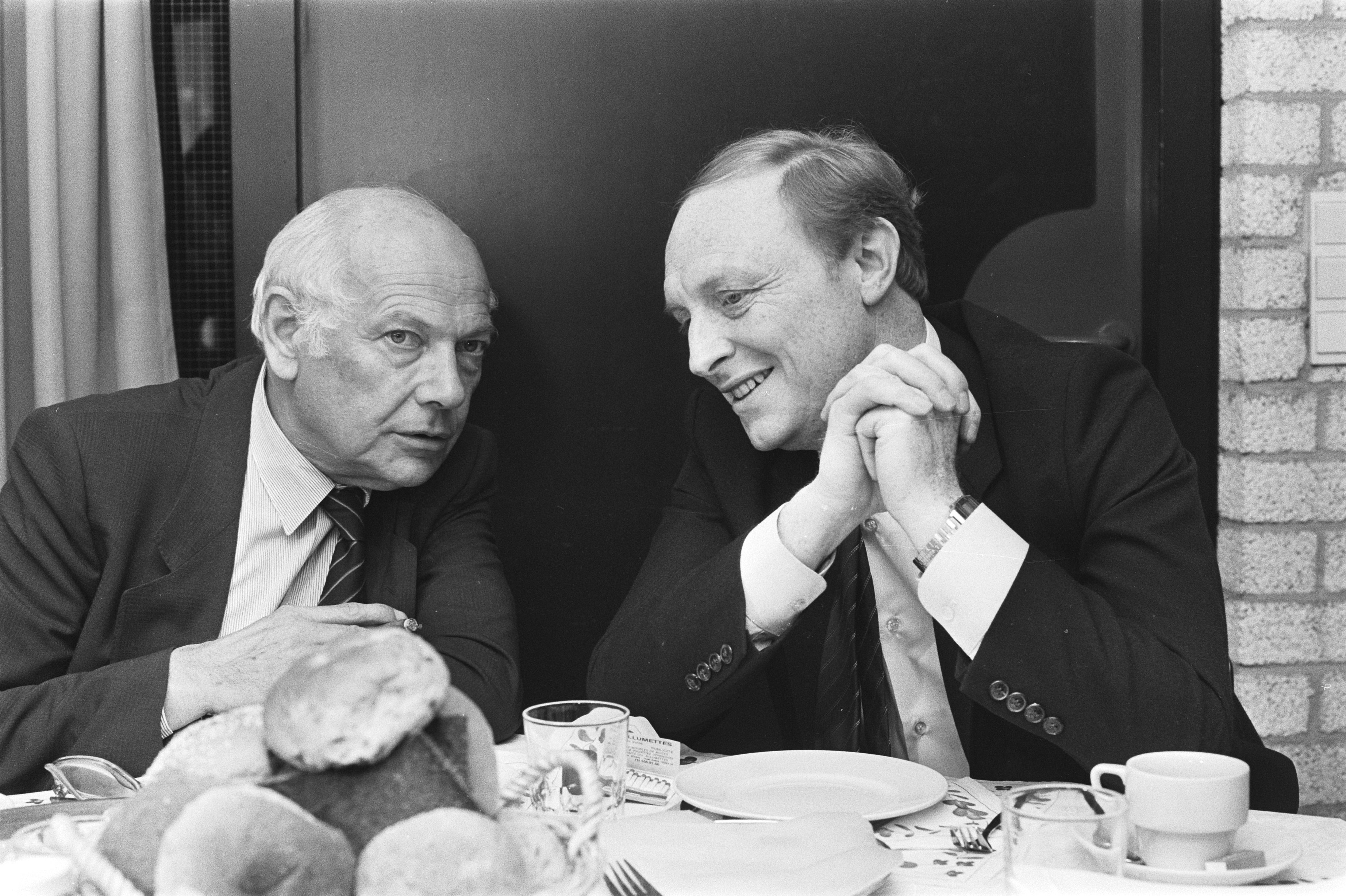 Collectie / Archief : Fotocollectie Anefo Reportage / Serie : [ onbekend ] Beschrijving : Start campagne voor Europese verkiezingen van PvdA (Rotterdam); Joop den Uyl (l) in gesprek met de leider Engelse Labour Party , Neal Kinnoch Datum : 26 mei 1984 Locatie : Rotterdam, Zuid-Holland Trefwoorden : Campagnes, GESPREKKEN, VERKIEZINGEN Persoonsnaam : Uyl, Joop den Instellingsnaam : Labour Party Fotograaf : Bogaerts, Rob / Anefo Auteursrechthebbende : Nationaal Archief Materiaalsoort : Negatief (zwart/wit) Nummer archiefinventaris : bekijk toegang 2.24.01.05 Bestanddeelnummer : 932-9810